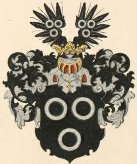 Hoyningen-Huene aadli- ja parunivapp